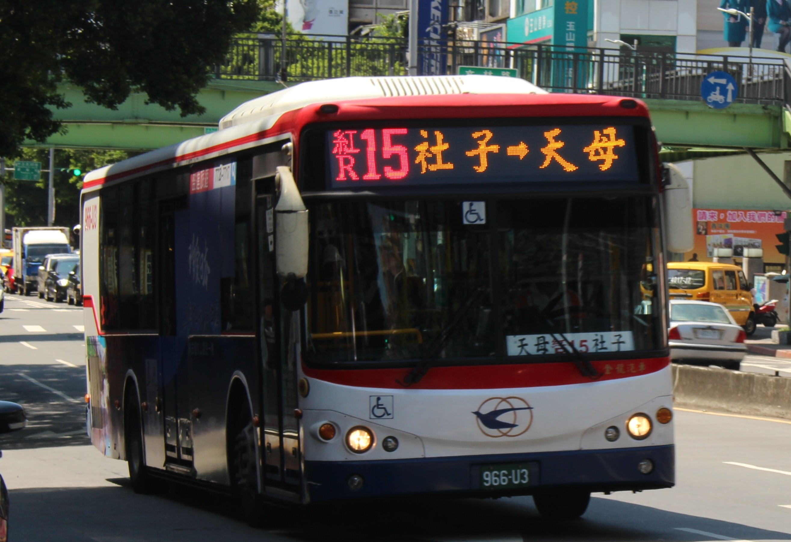 中興巴士2015 KINGLONG KL6112U1五期 966-U3 R15